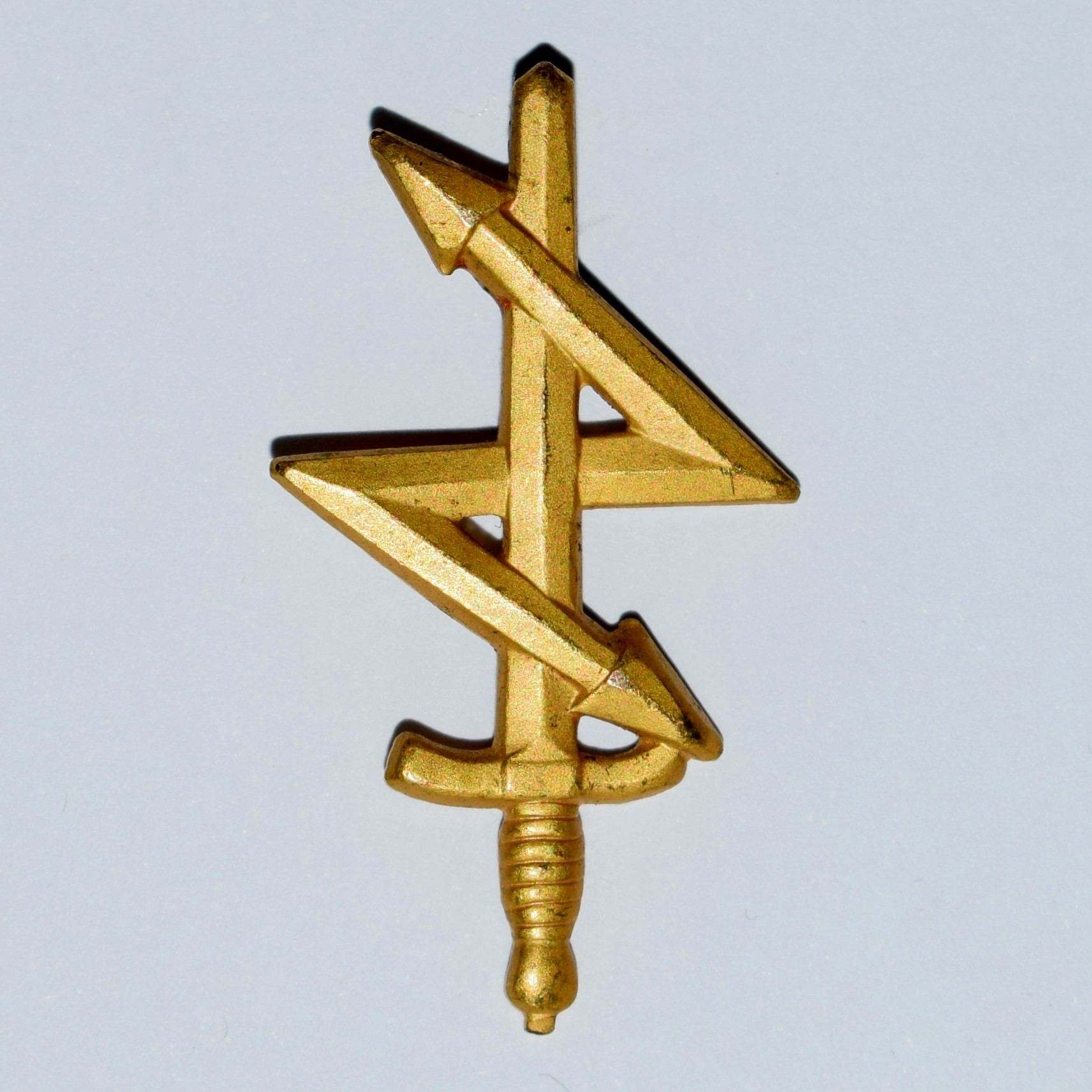 Truppslagstecken m/60 för signaltrupperna